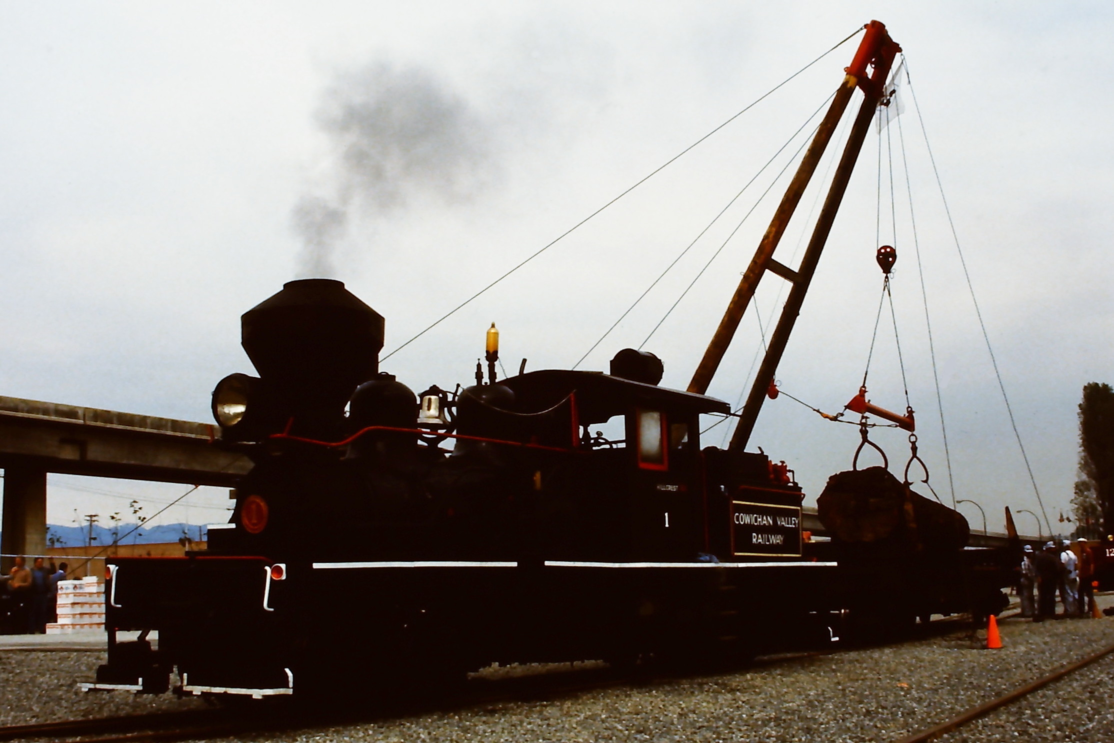 Cowichan Valley Railway Nummer 1 auf der SteamExpo 86 in Vancouver